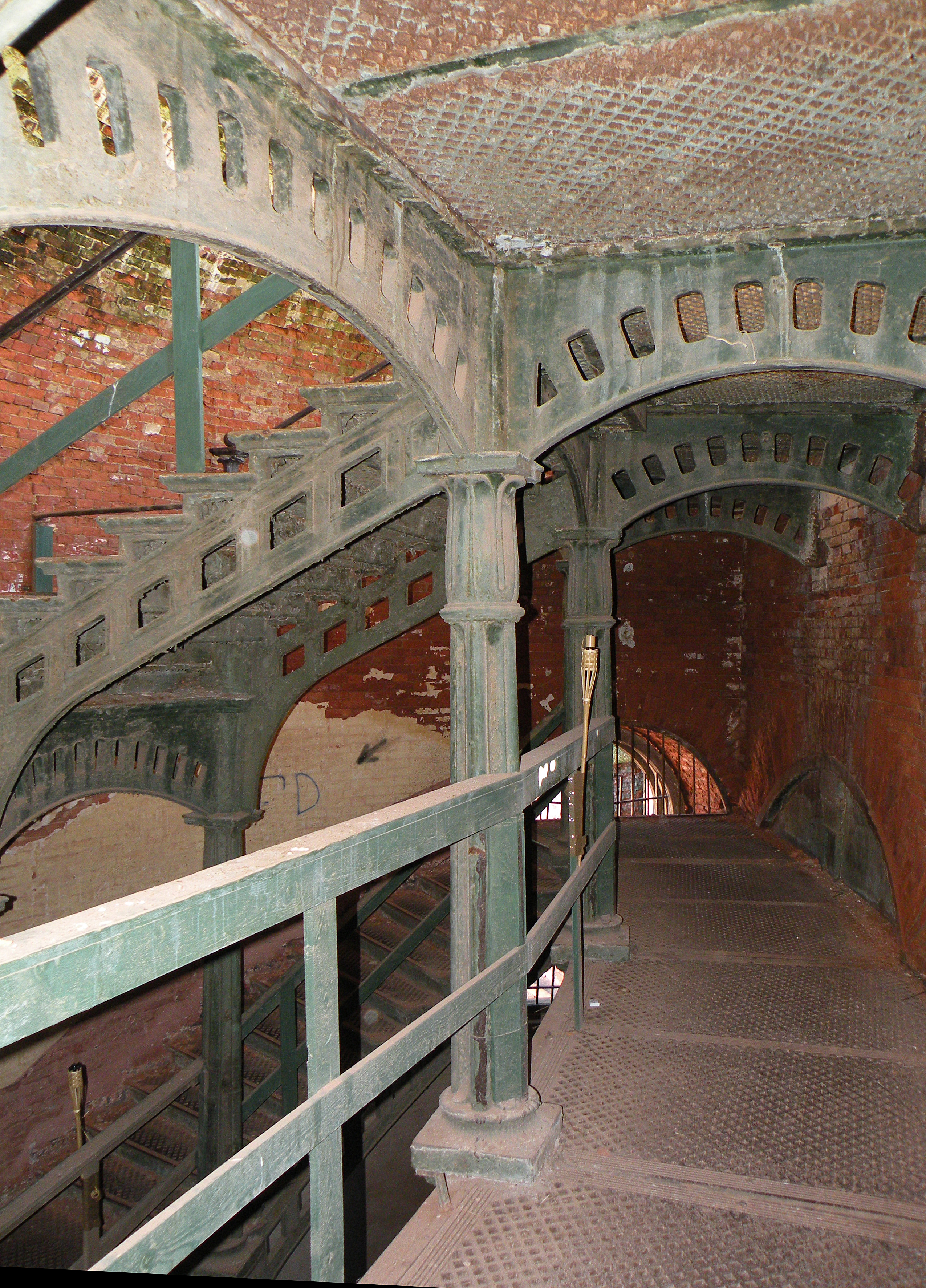 Форт Александр I.Трапы.